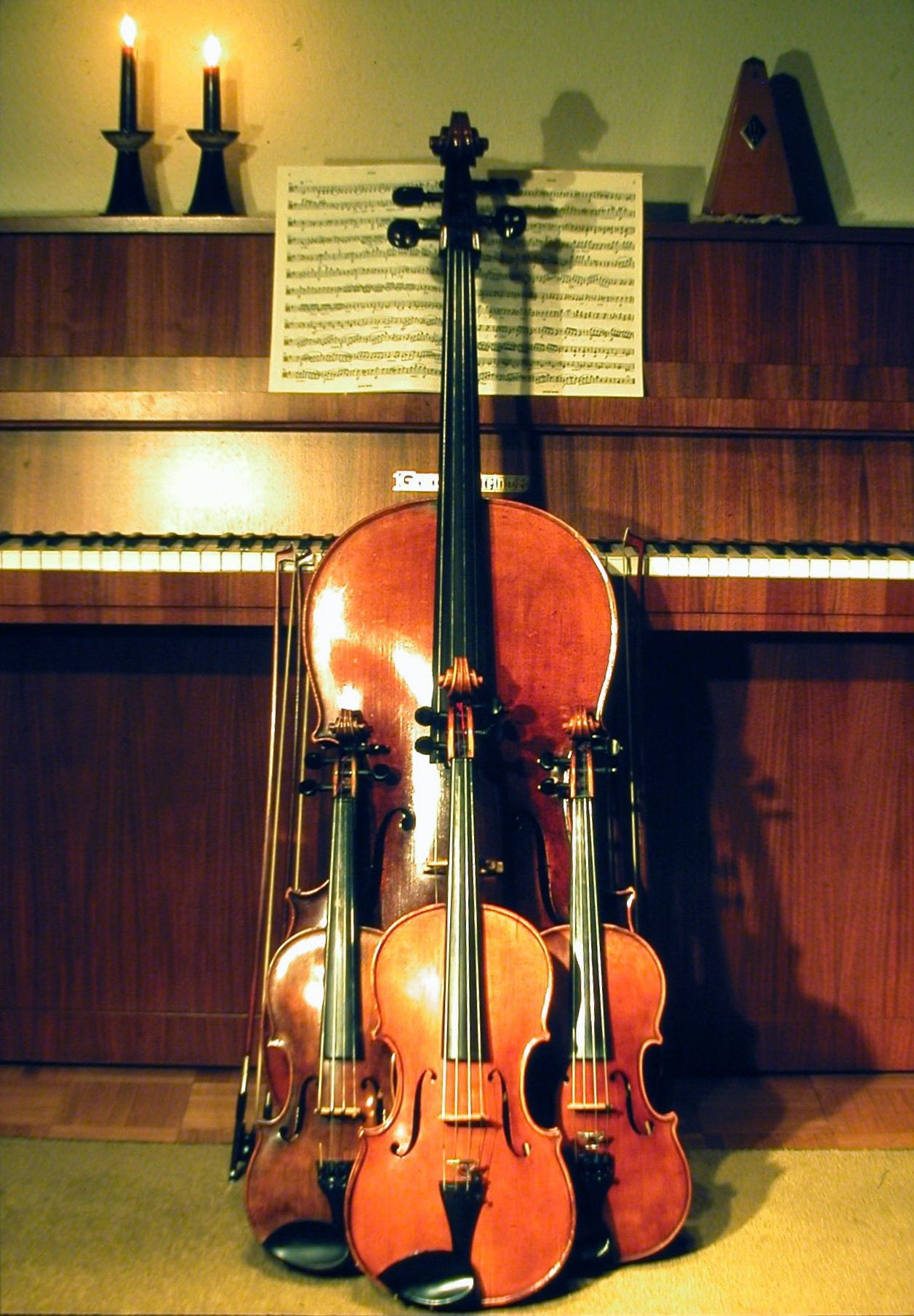 2 Violinen, Viola, Cello und Klavier